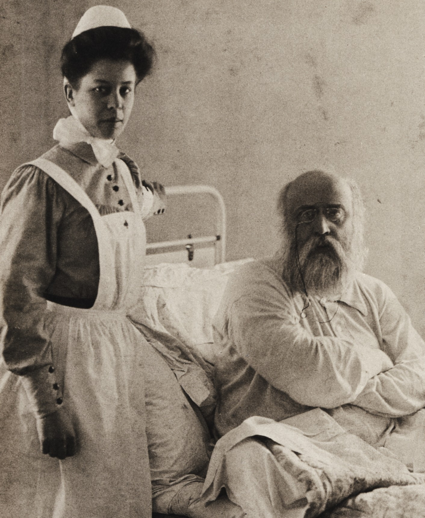 Gustaf Fröding införd i särk på sin sjukbädd tillsammans med sköterskan Signe Trotzig, 31 maj 1908.